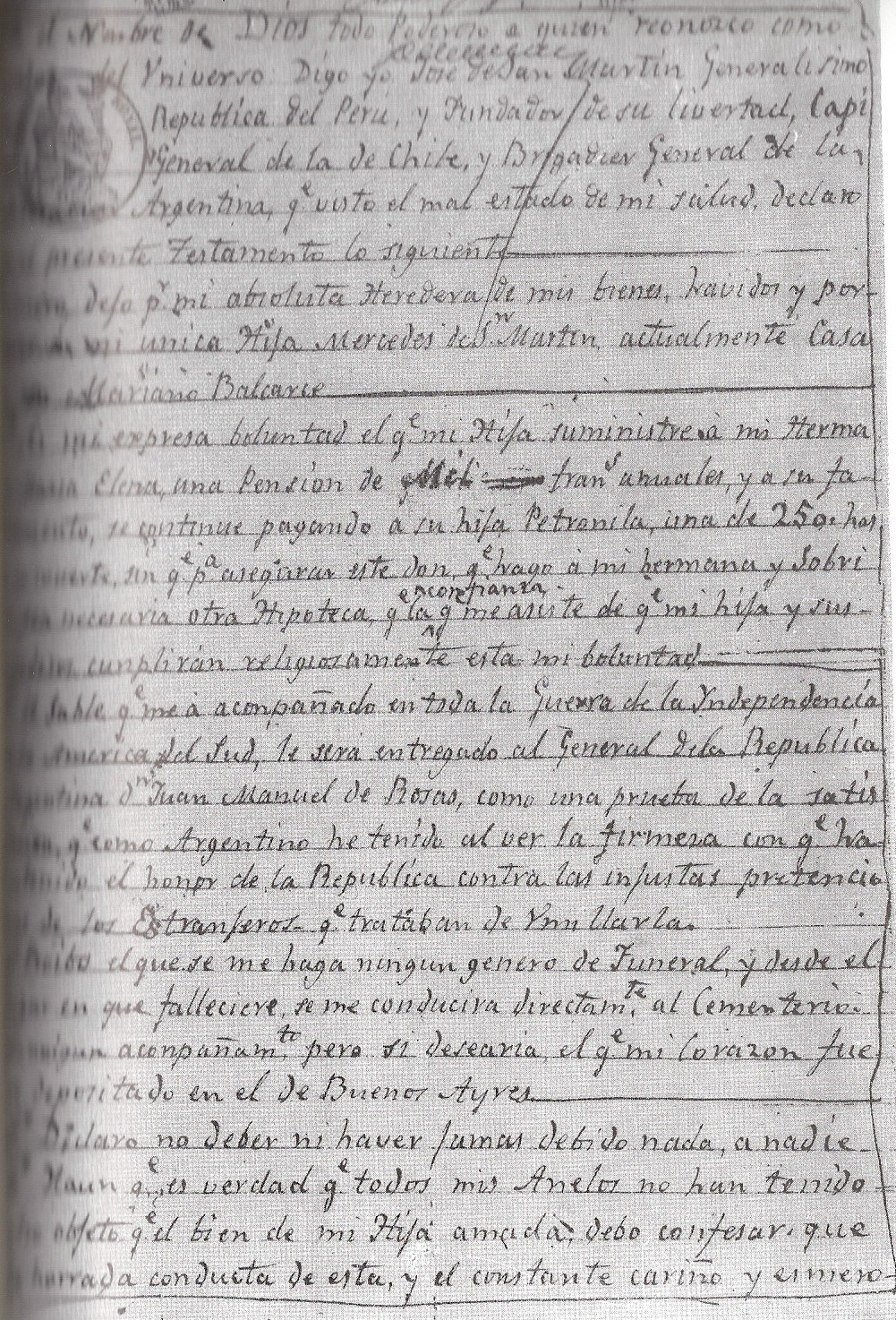 Testamento de José de San Martín. En el tercer artículo lega su sable corvo a Juan Manuel de Rosas